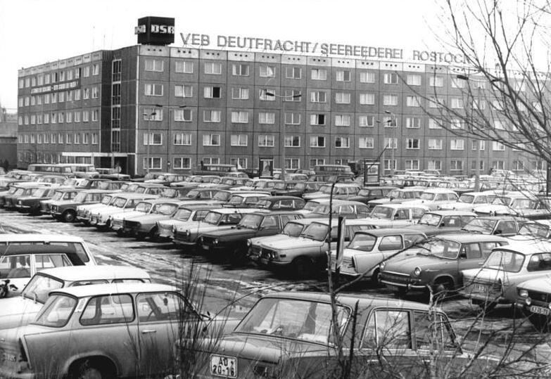 Rostock, Direktionsgebäude, Parkplatz ADN-Zentralbild Sindermann Lie-1.3.1983.Rostock: Das Direktionsgebäude des Kombinates Seeverkehrs- und Hafenwirtschaft Rostock-Überseehafen.